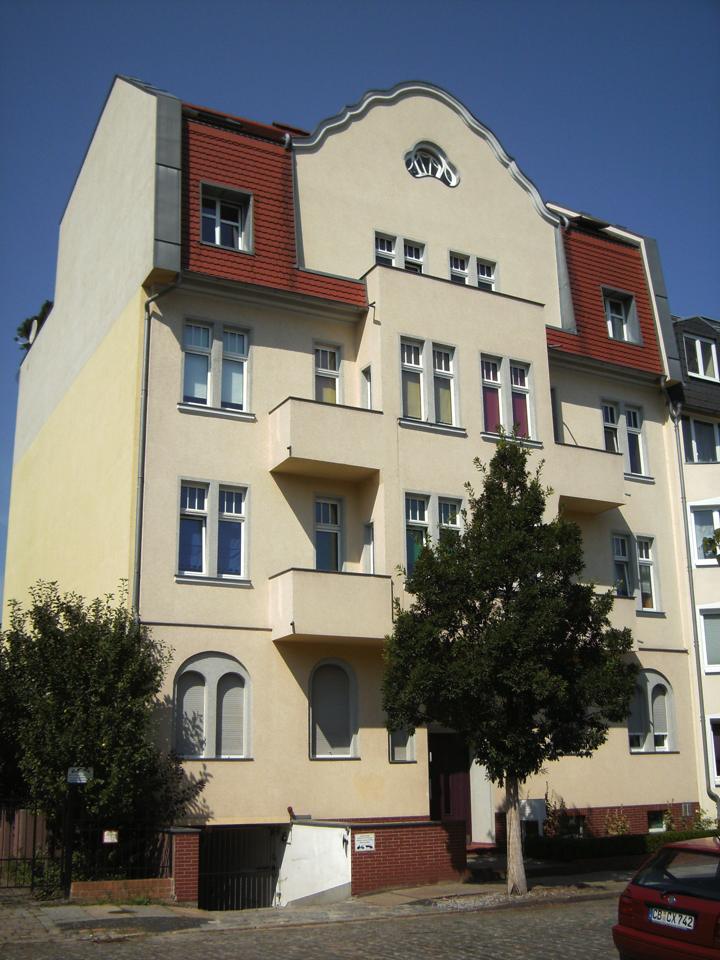 Wernerstr. 48